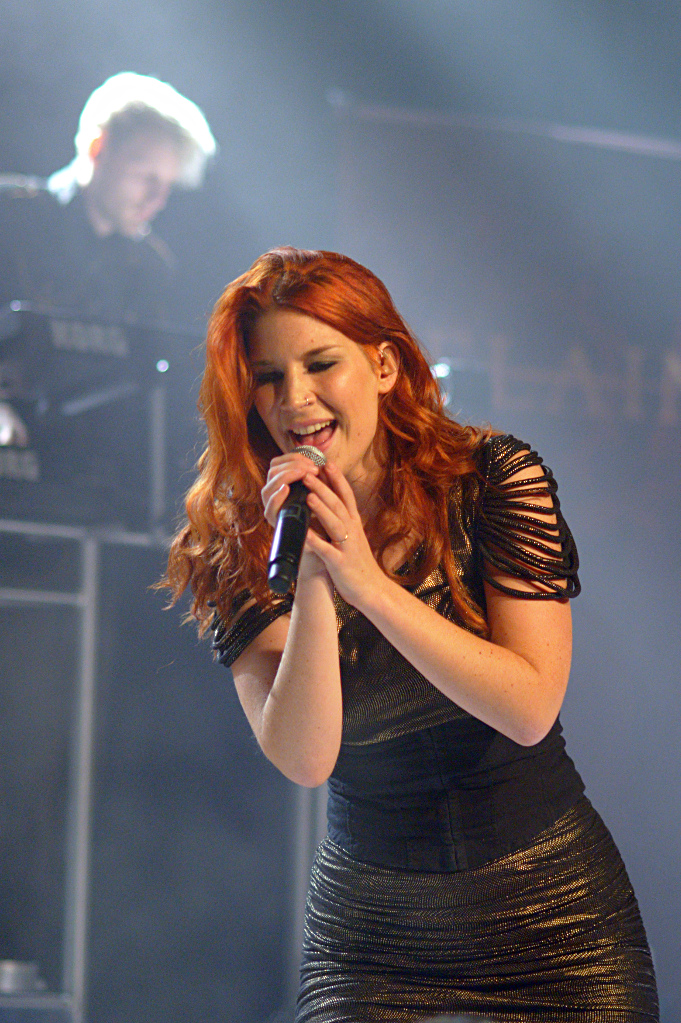 Delain Essen 18. Oktober 2012